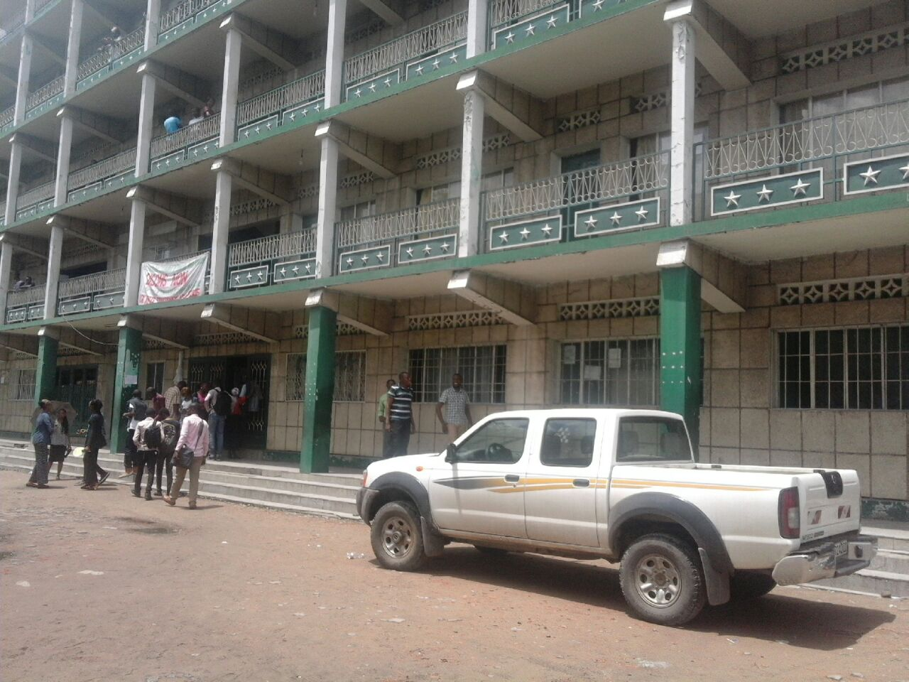 Université Kimbanguiste à Kalamu, Kinshasa, RDC